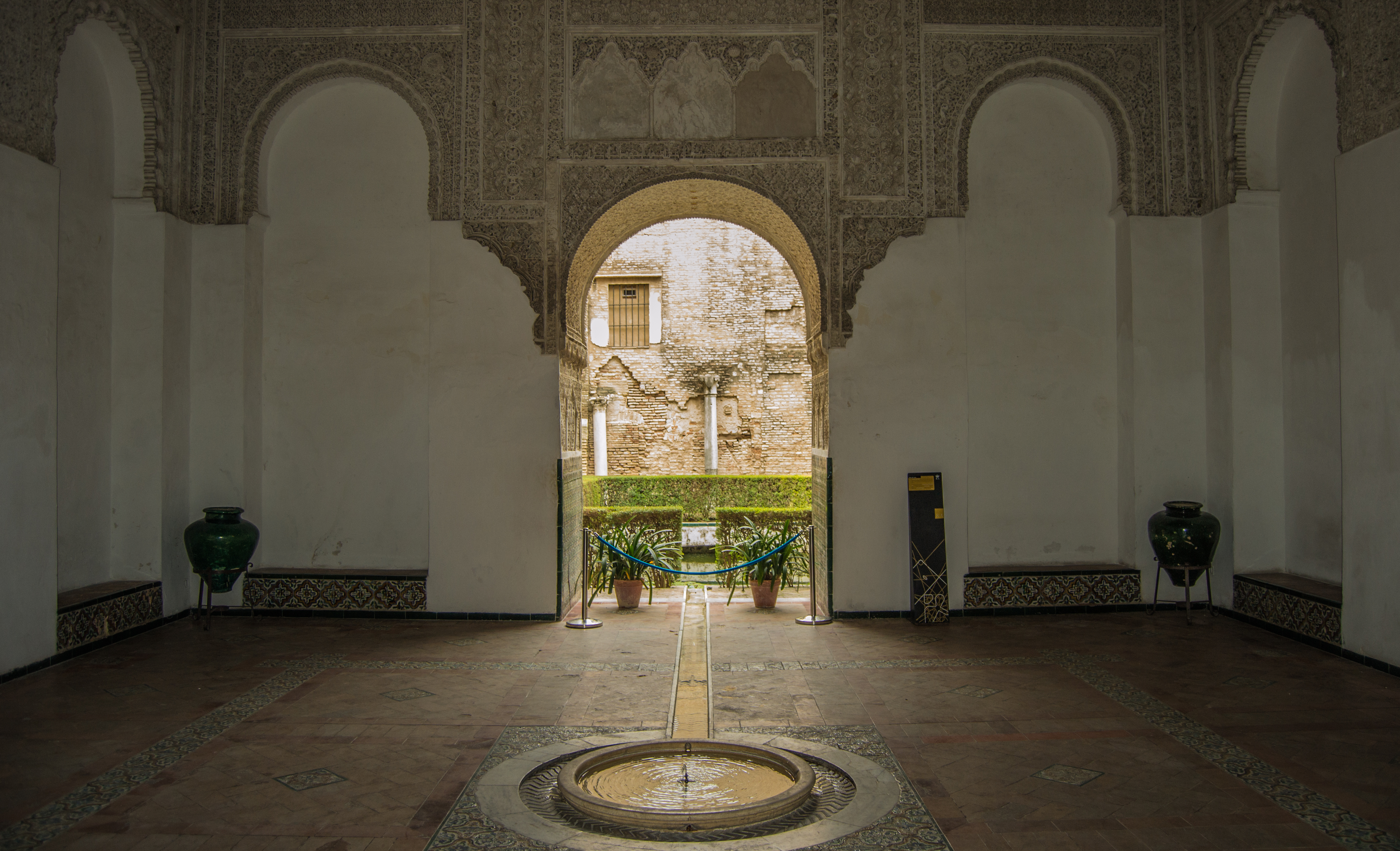 Interior de la Sala de la Justicia, en el Real Alcázar de Sevilla, y el acceso al Patio del Yeso